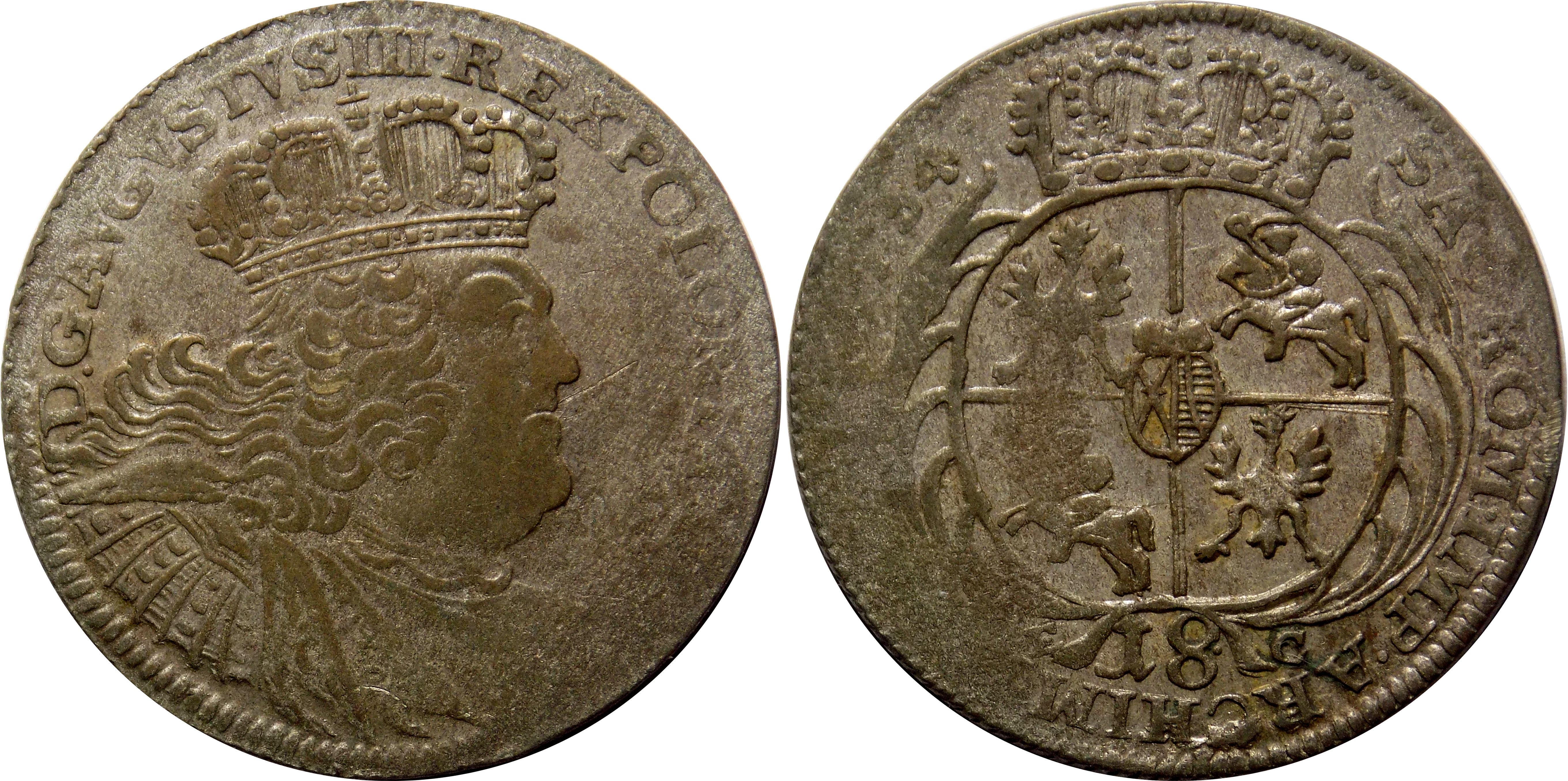 Ort koronny 1754